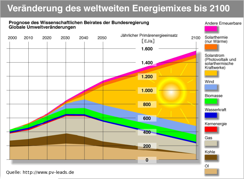 Grafik zur Prognose der Entwicklung des weltweiten Energiemixes bis 2050 des wissenschaftlichen Beirats der Bundesregierung Deutschlands